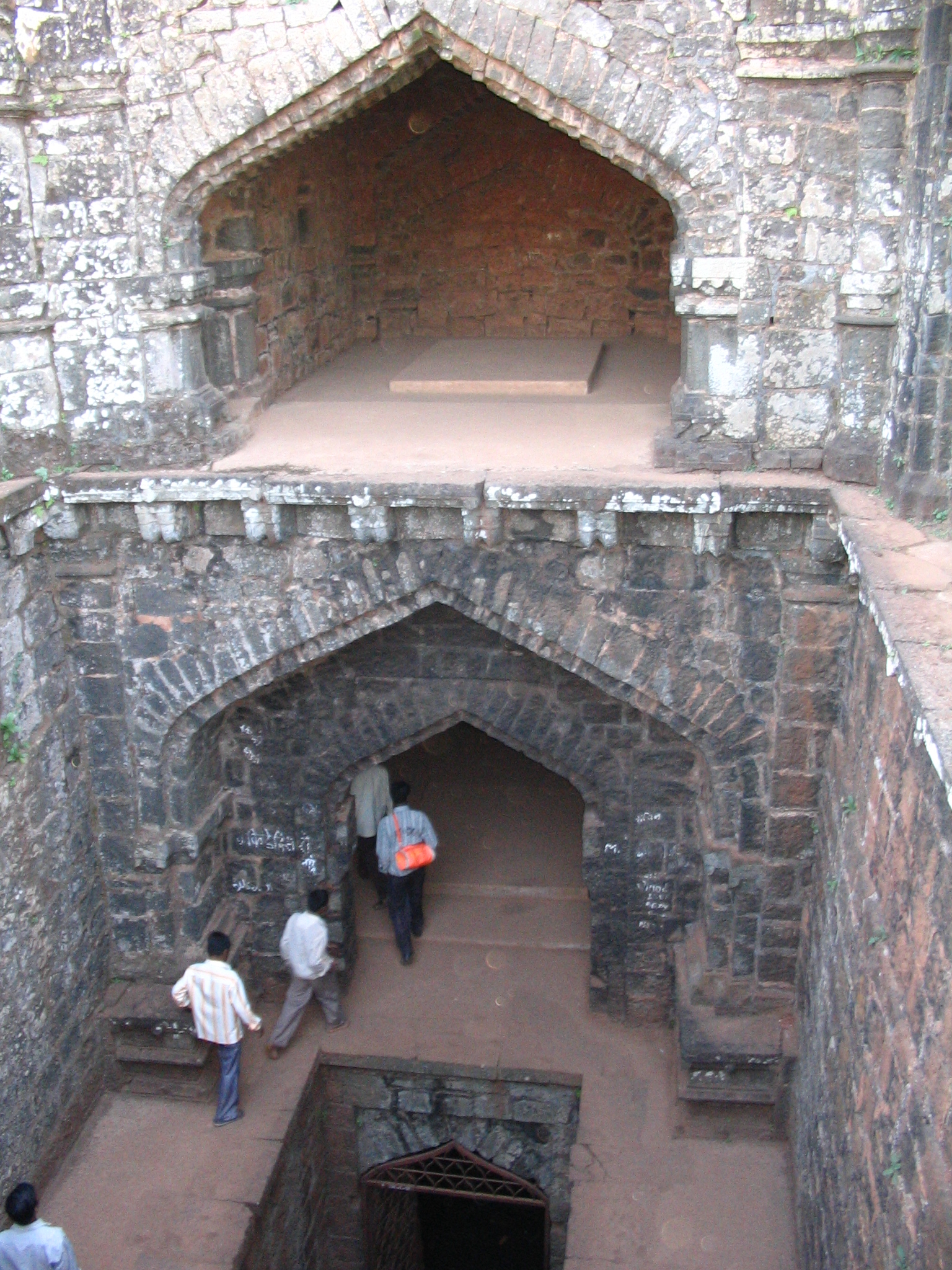 Inside Panhala fort, Maharashtra, India